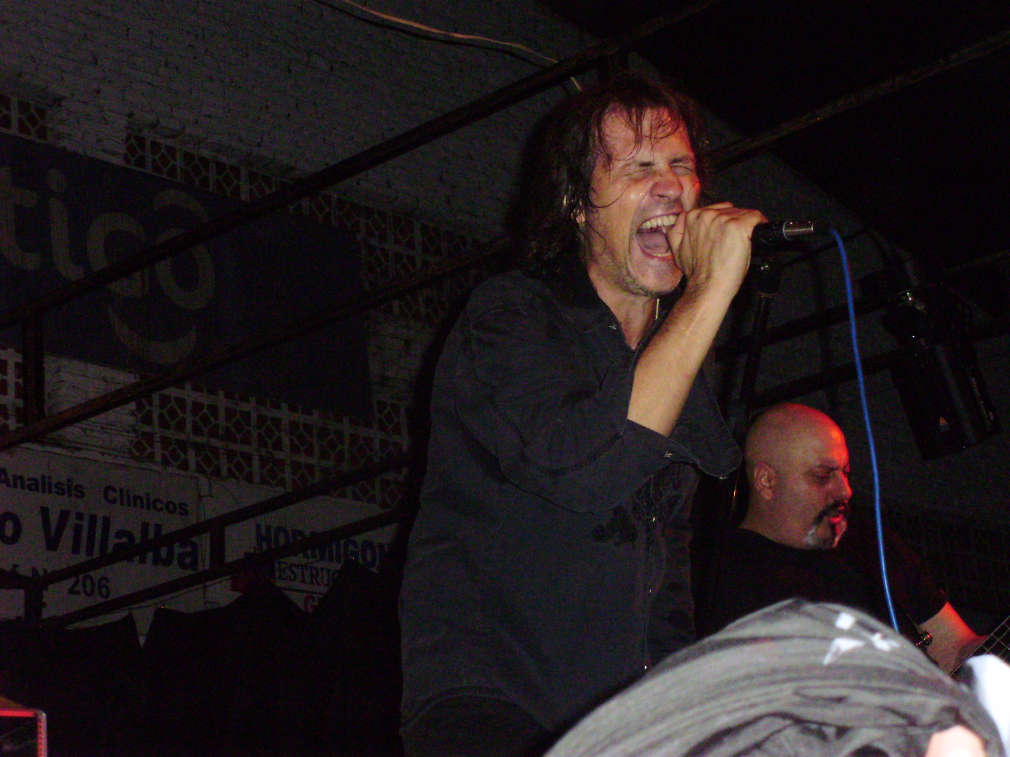 Gimnasio Municipal de San Lorenzo